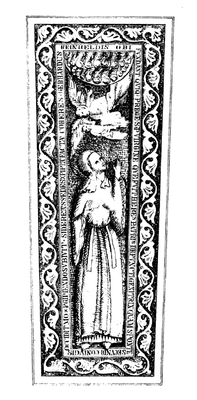 Grabplatte Reinhildis. Aus: August Bahlmann: St. Rendel. Friedrich Regensberg, Münster in Westfalen 1858.